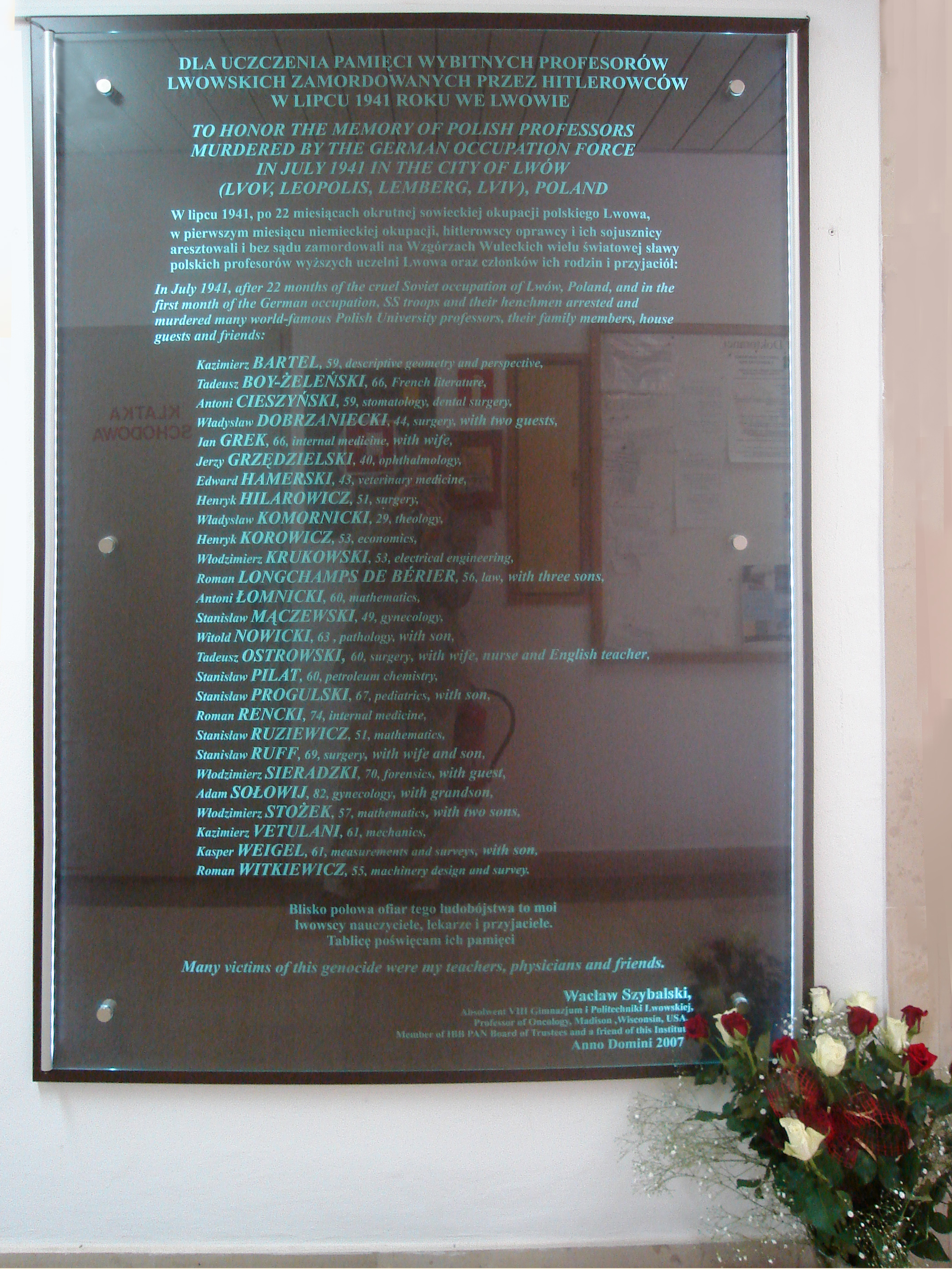 Kryształowa tablica poświęcona zamordowanym przez hitlerowców polskim profesorom ufundowana przez prof. Wacława Szybalskiego, umieszczona w Instytucie Biofizyki i Biochemii PAN w Warszawie przy ul. Pawińskiego 5, odsłonięta 24 czerwca 2008 przez noblistę, prof. Jamesa D. Watsona.